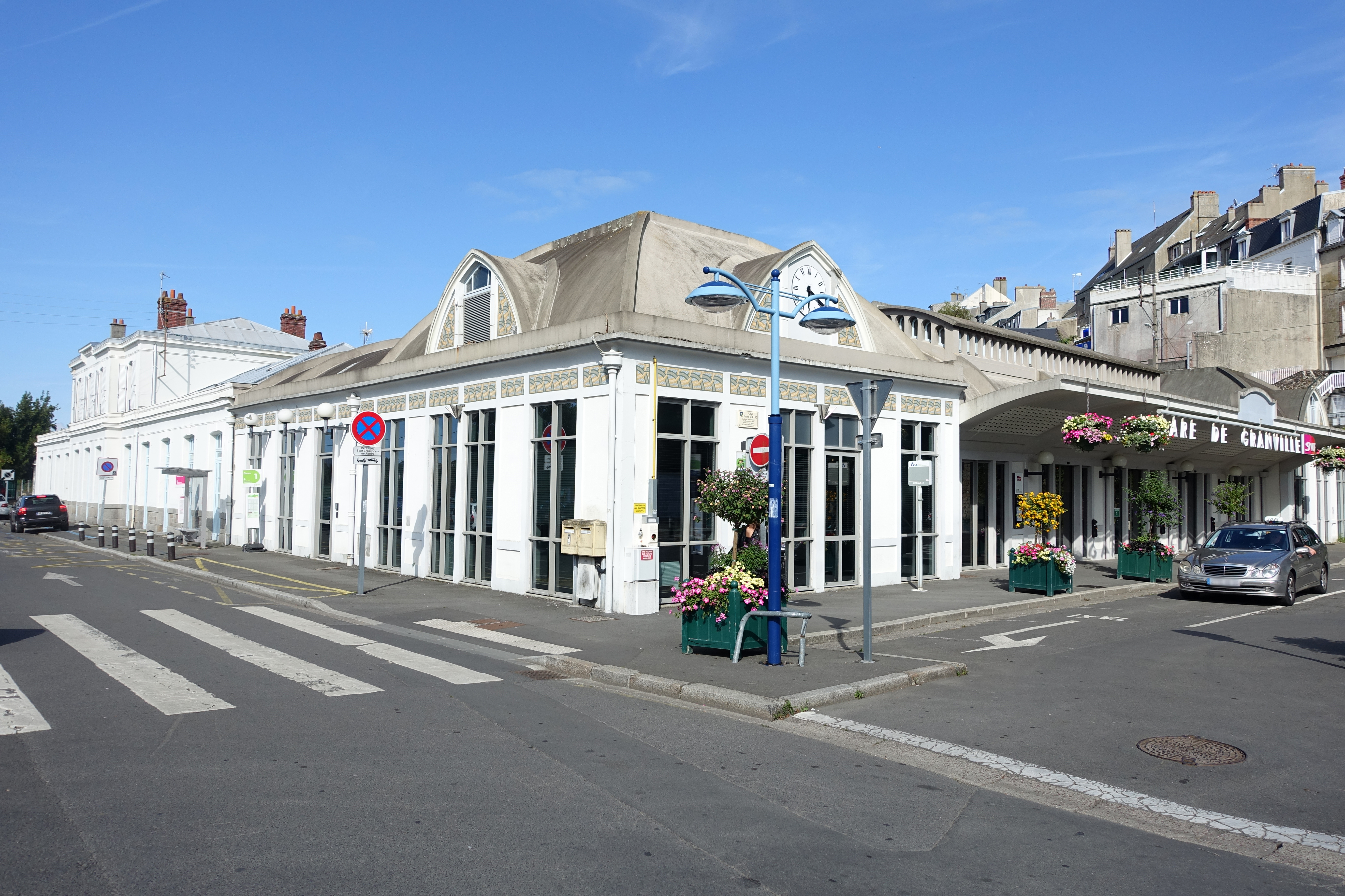 Bâtiment voyageur de la gare de Granville.